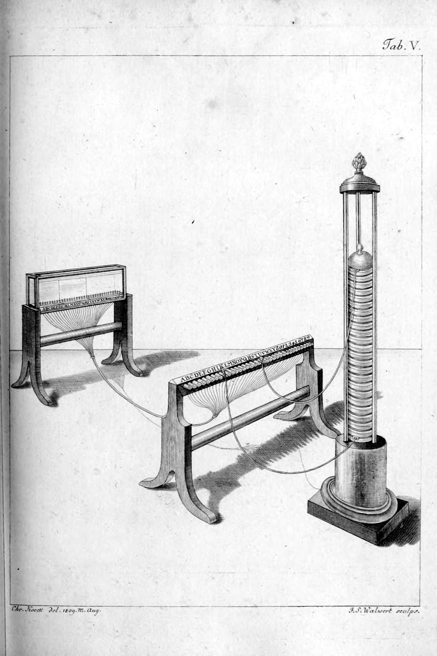 Tab. V (following page 414). Overview of Sömmerring's electric telegraph.